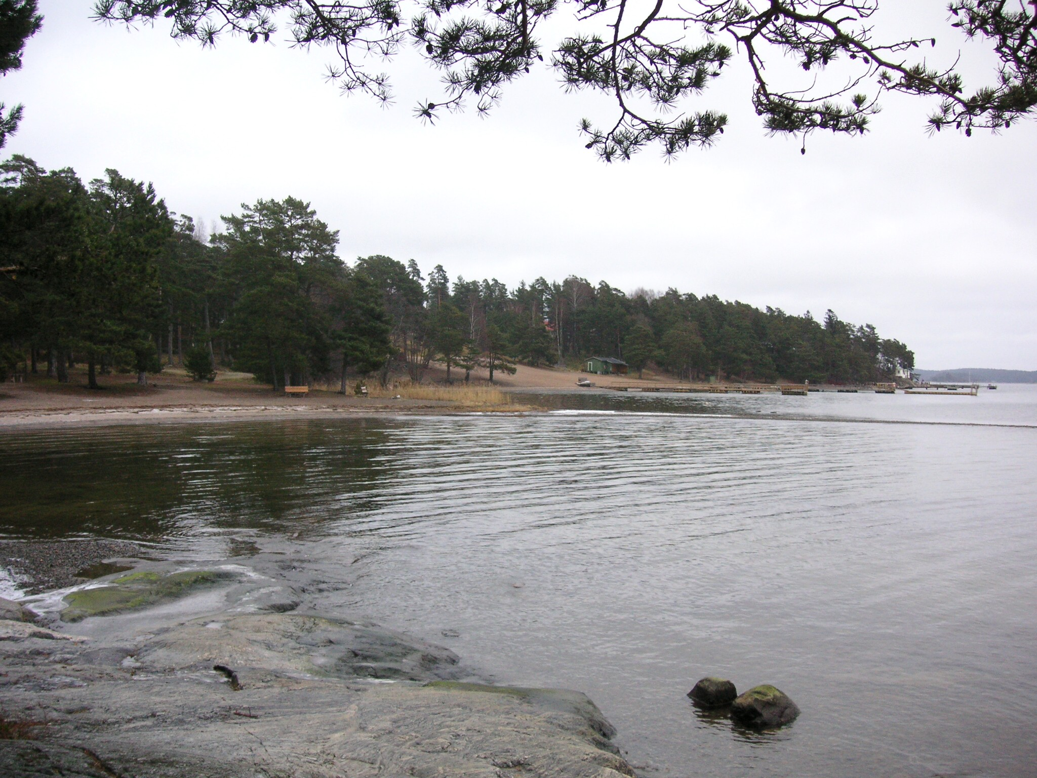 Årsta havsbad, Haninge kommun